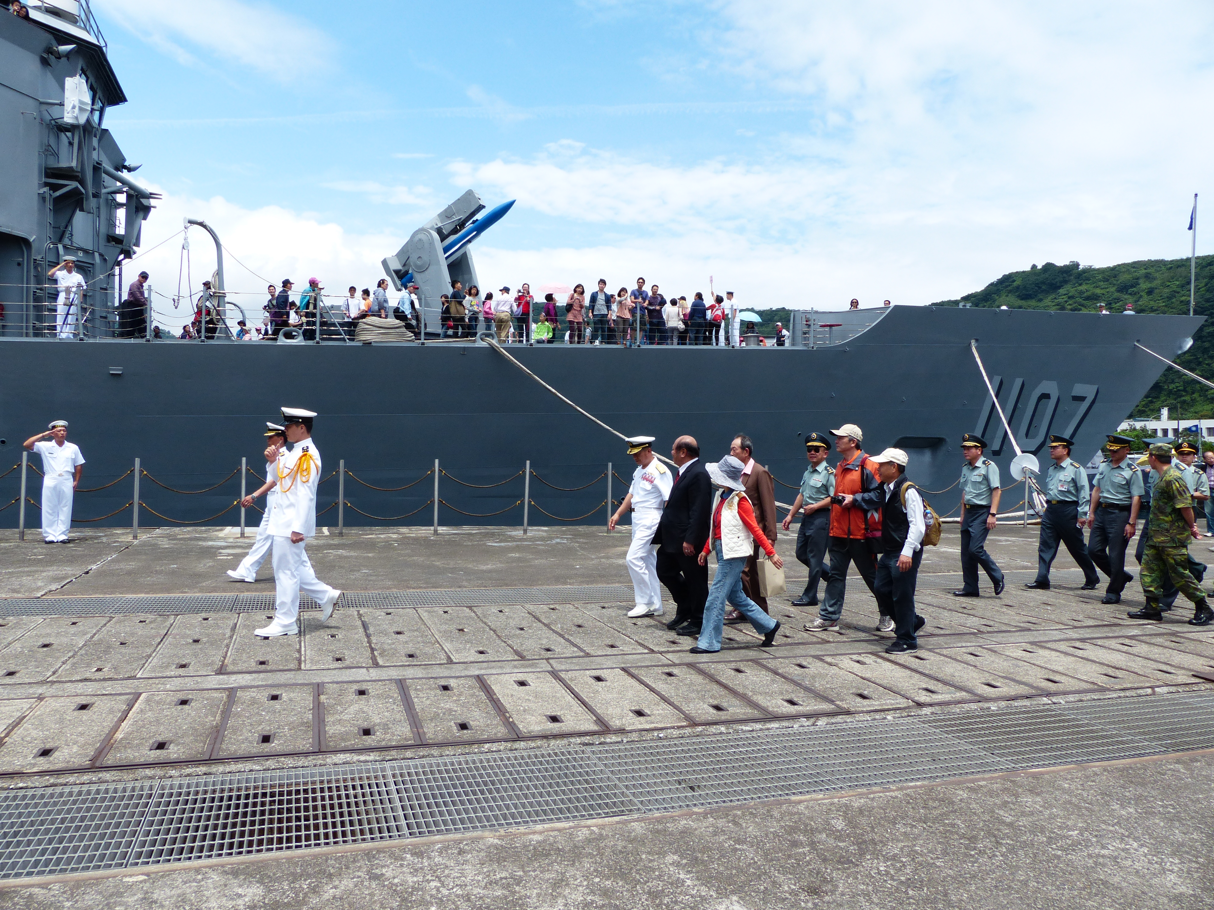 2013年中正軍港營區開放活動，中華民國海軍艦隊指揮部司令蒲澤春中將由參謀前導，陪同蘇澳鎮鎮長林騰煌伉儷、陸軍支援單位將校及媒體記者視察12號碼頭，巡防艦子儀（PFG-1107）與碼頭水兵行禮致敬。